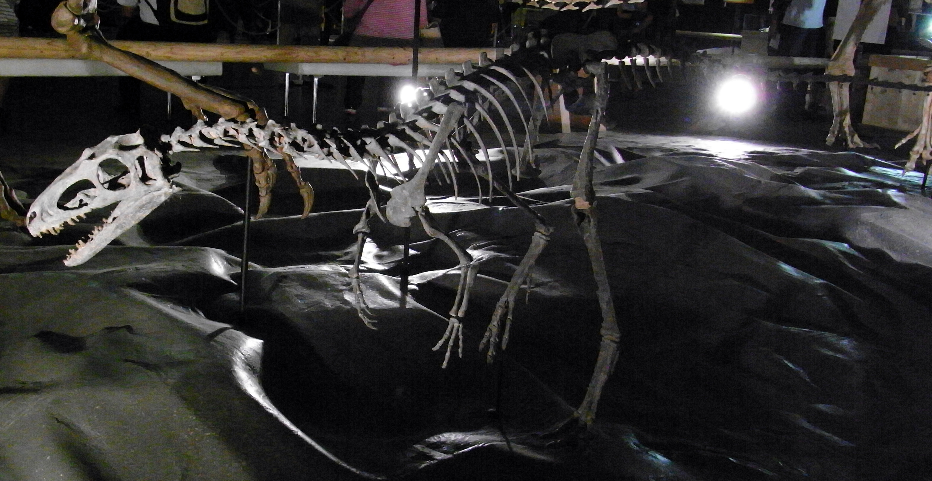 ズニティラノ。